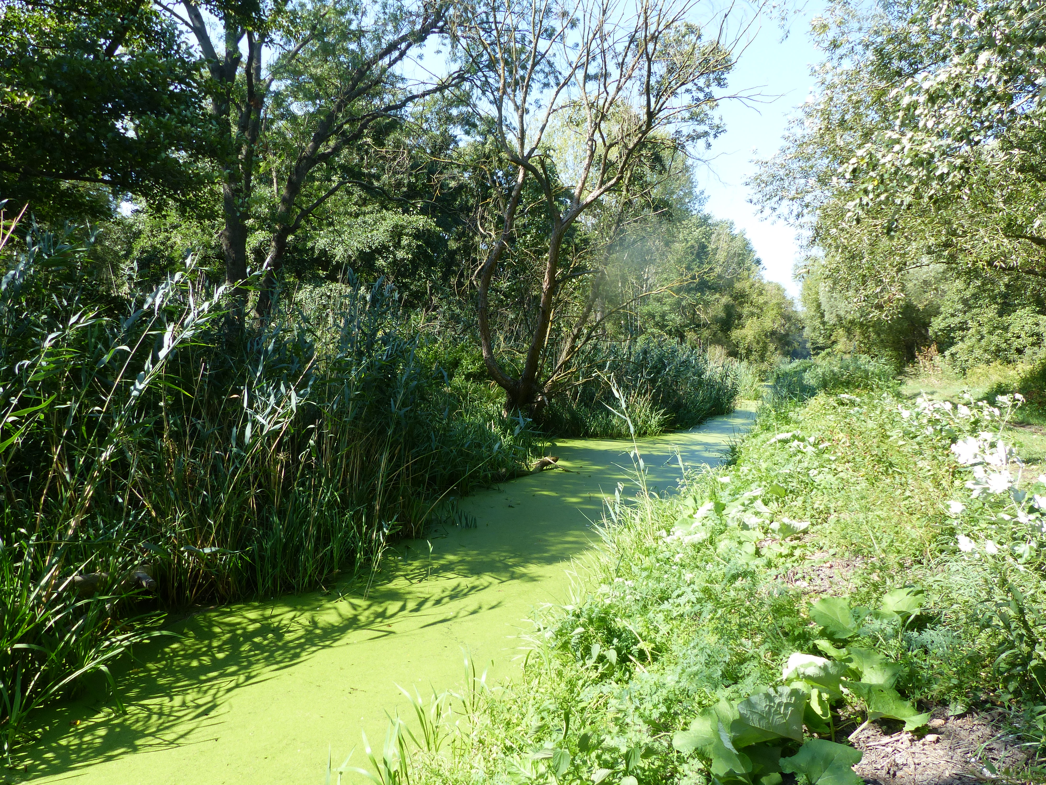 Békalencse. A felvétel a kónyi Tündértó mellett futó csatornánál készült 2017. szeptember 9-én.